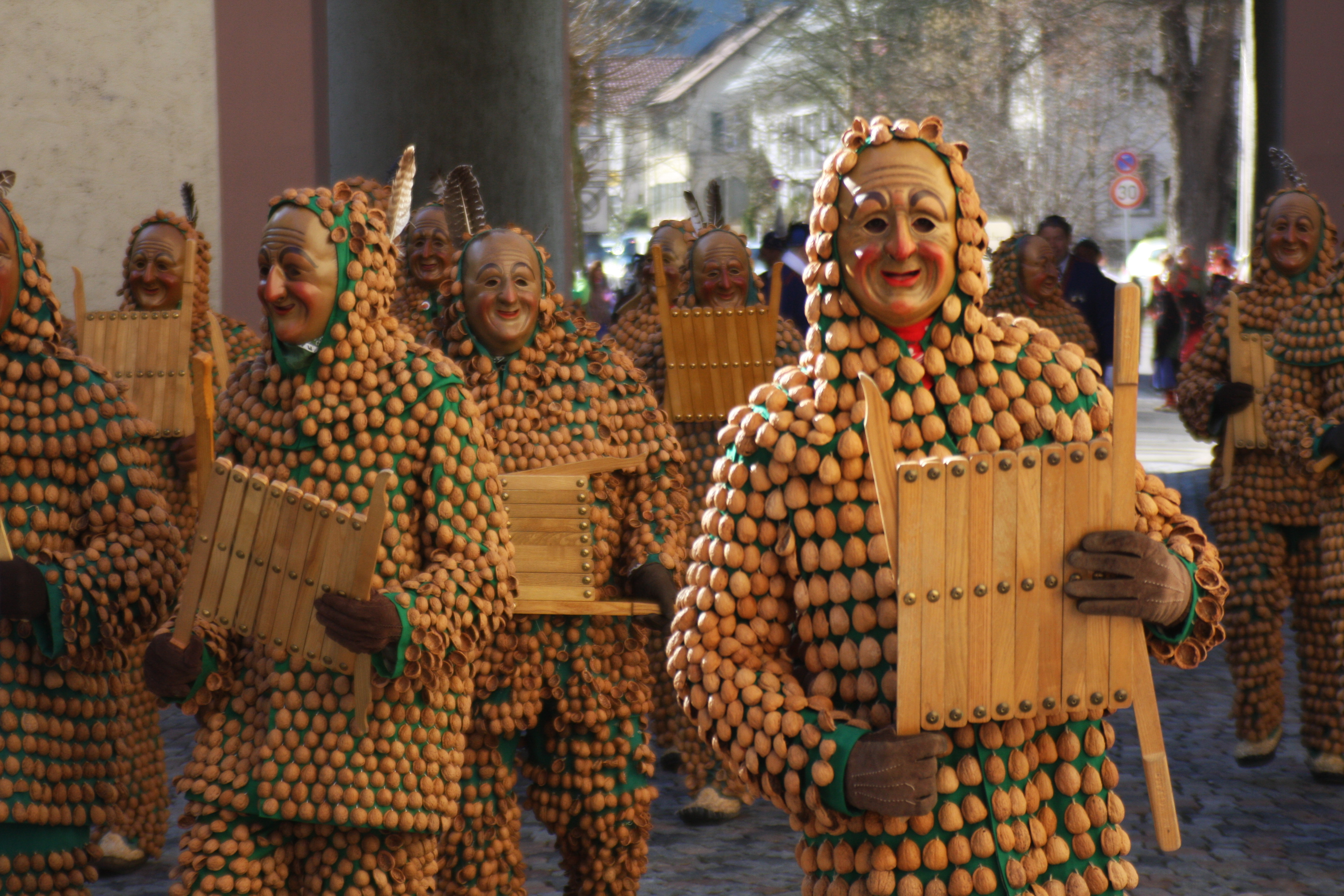 schellemaendig_wolfe_2017_021 Wolfach, Schellemändig (Fasnetsmontag) 2017